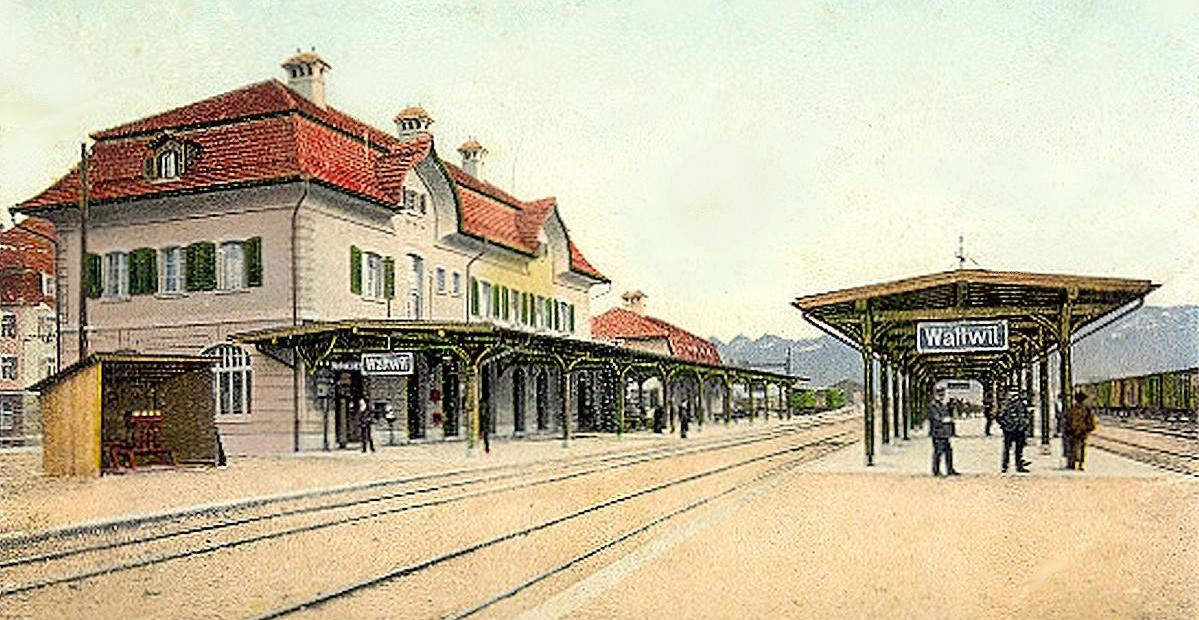 Bahnhof Wattwil, damals im gemeinsamen Besitz der SBB und der Bodensee-Toggenburg-Bahn (BT). Als 1910 die BT eröffnet wurde und die SBB die Rickenlinie nach Uznach in Betrieb nahmen, wurde in Wattwil ein neues, grösseres Aufnahmegebäude notwendig.Ansichtskarte, Lithographie